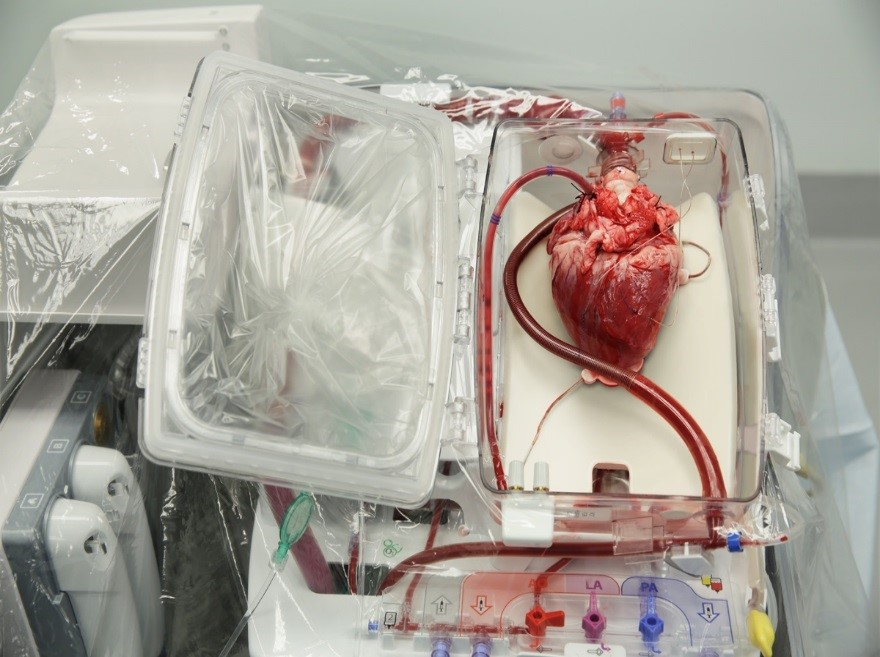 Nová metoda k transplantaci srdce v IKEM